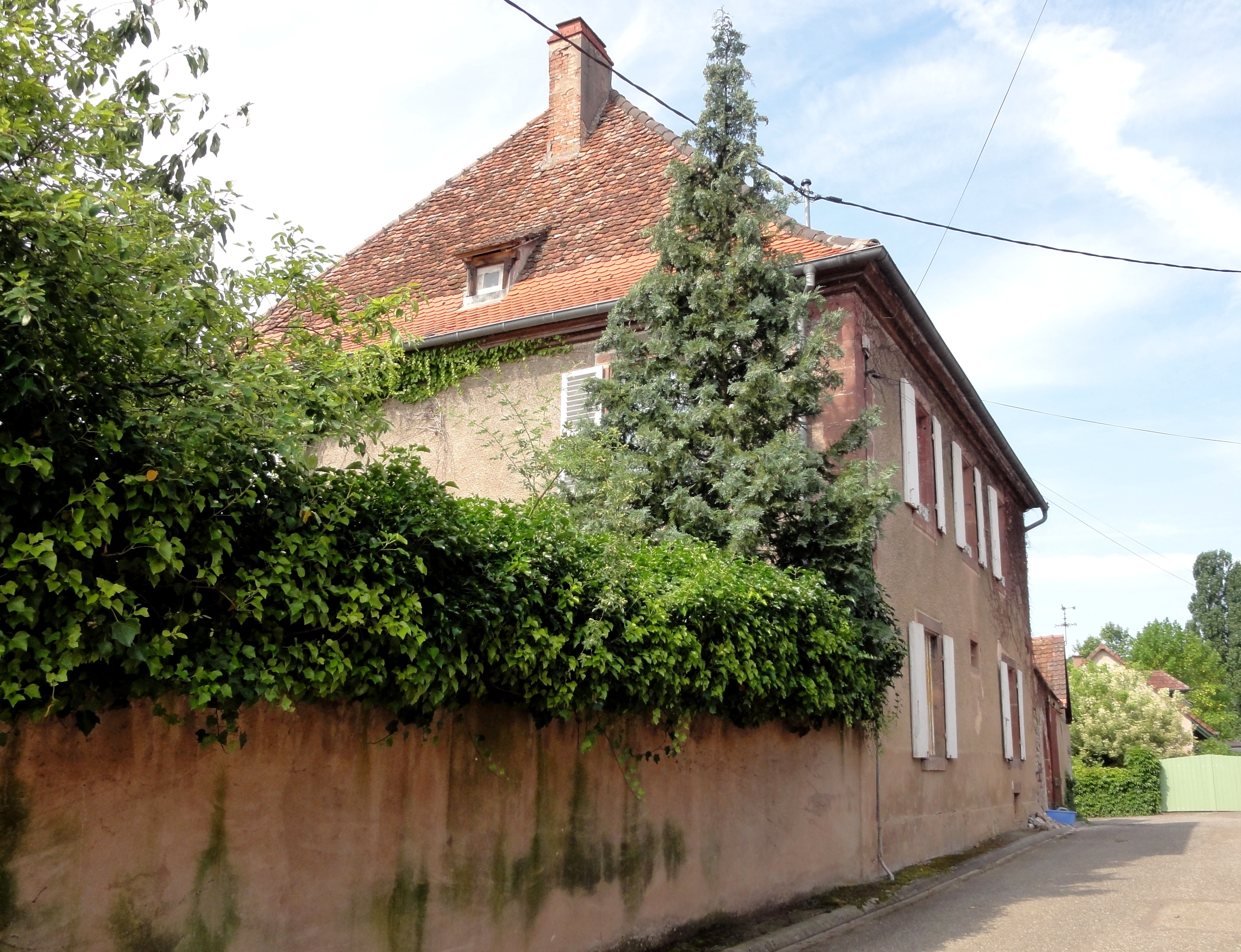 Alsace, Bas-Rhin, Gougenheim, Presbytère (XVIIIe-XIXe), 1 rue des Seigneurs. .